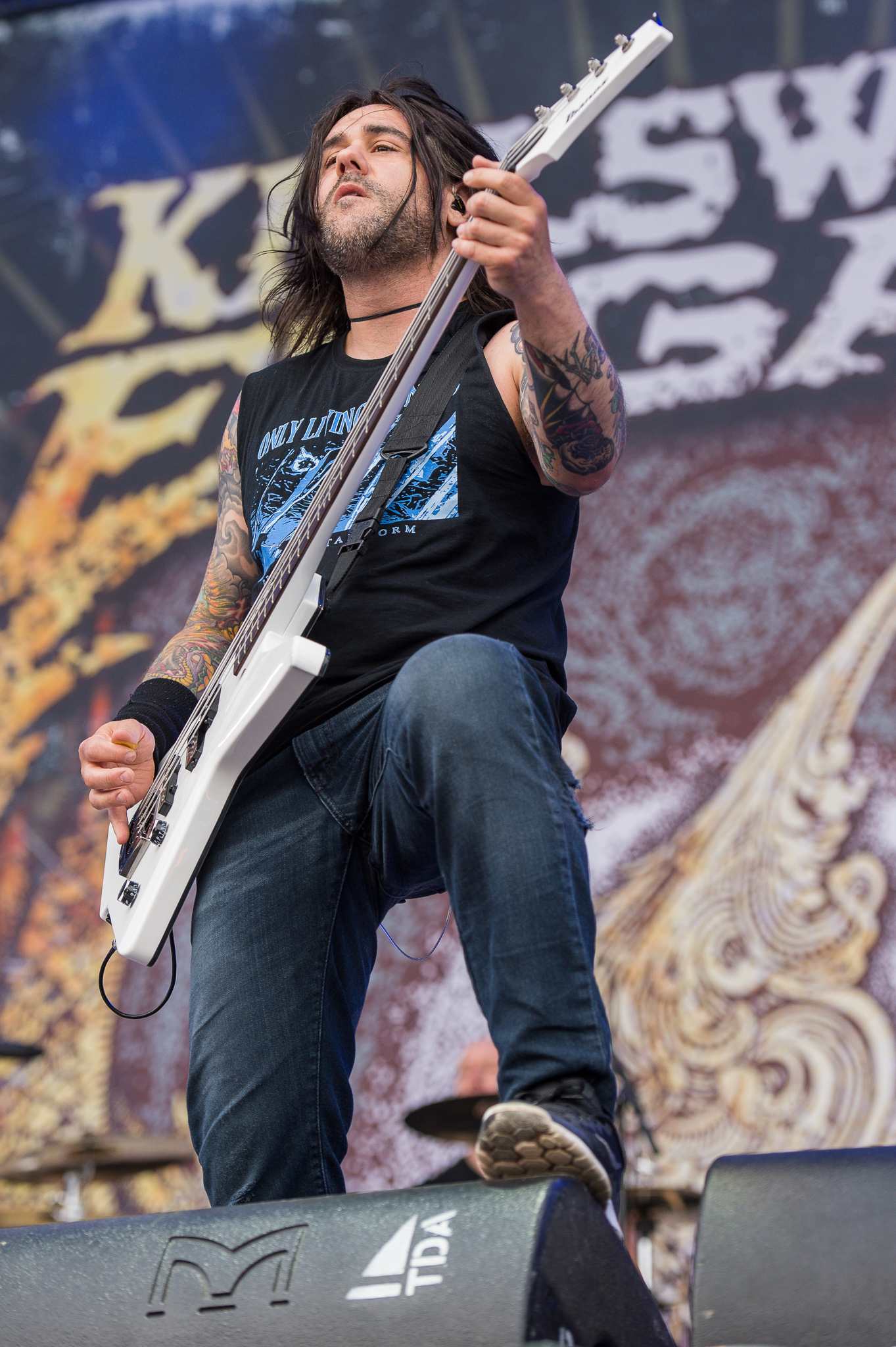 ARGO-Konzerte,Beck's Park Stage,Festival,Killswitch Engage,Konzert,Livekonzert,Livemusik,Mike D’Antonio,Musik,RiP,Rock im Park 2016